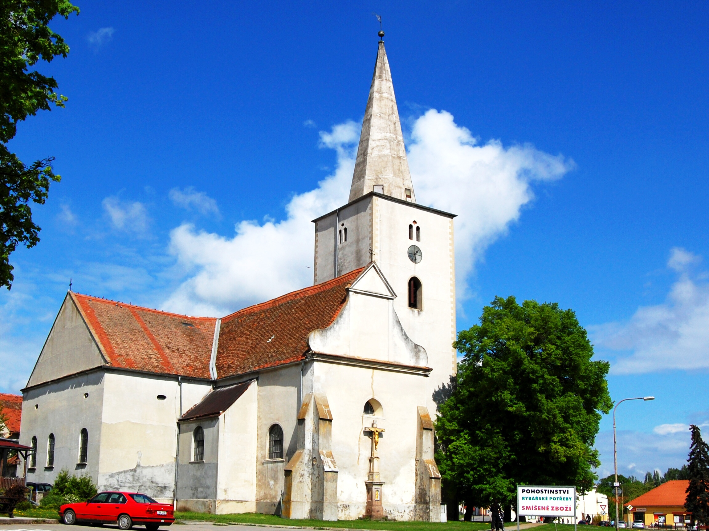 Kostel sv. Kunhuty, náměstí, Hostěradice 90.